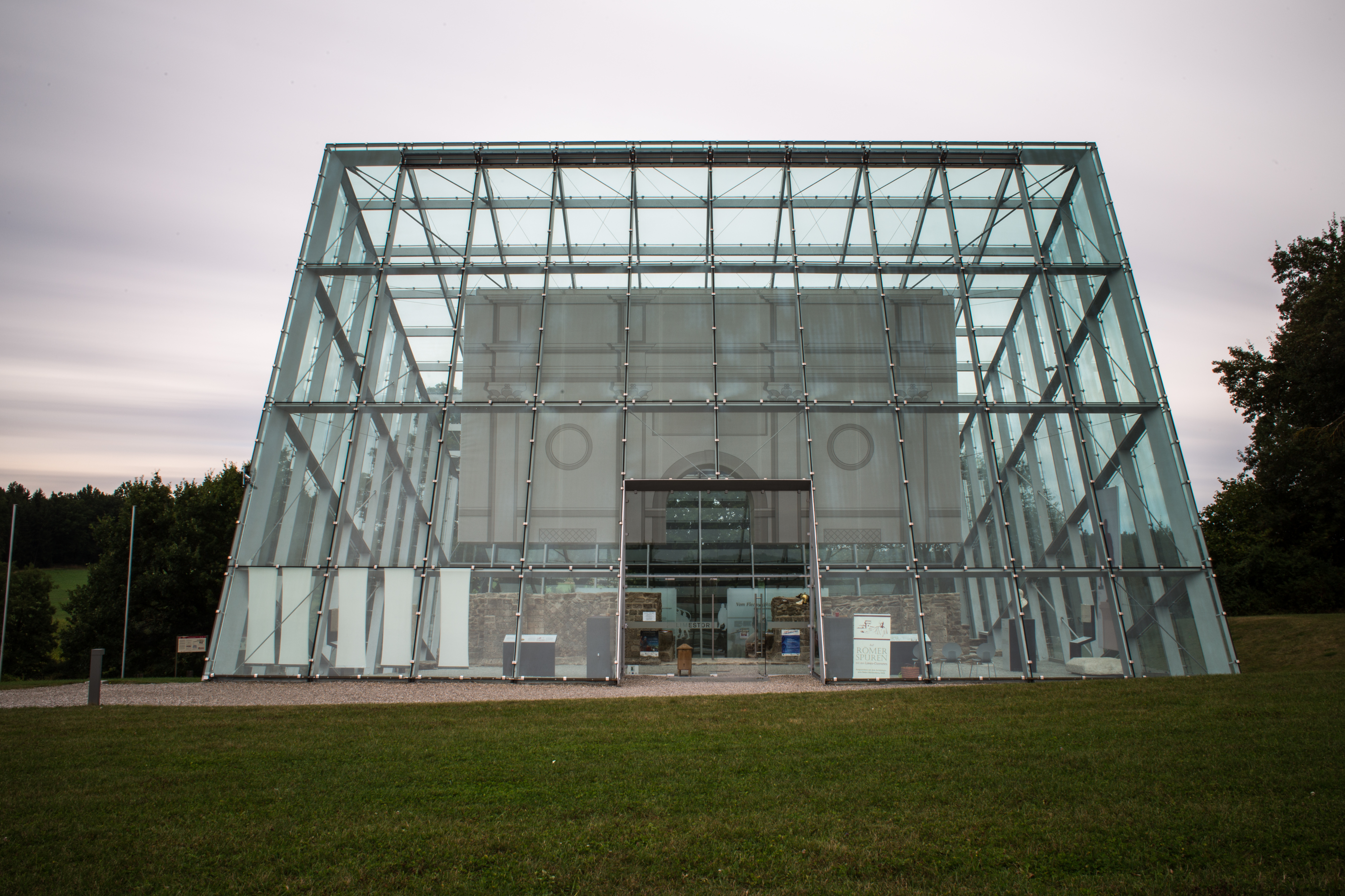 Schutzbau und Kulisse über der Ausgrabung des Limestors bei Dalkingen